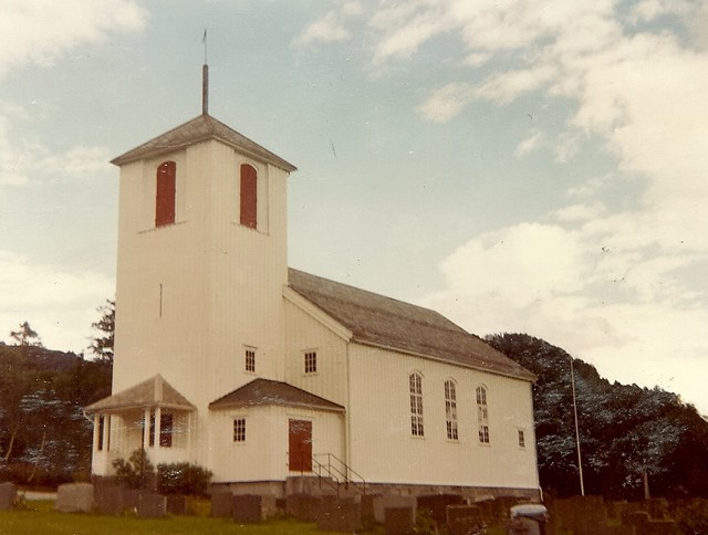 Kjølsdalen kyrkje en: Kjølsdalen church in Kjølsdalen, Eid, Sogn og Fjordane, Norway